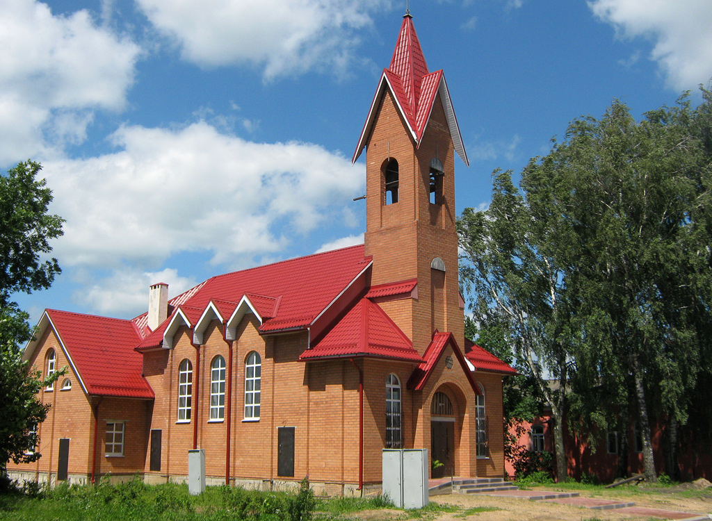 Чэрвень. Касцёл на плошчы Свабоды